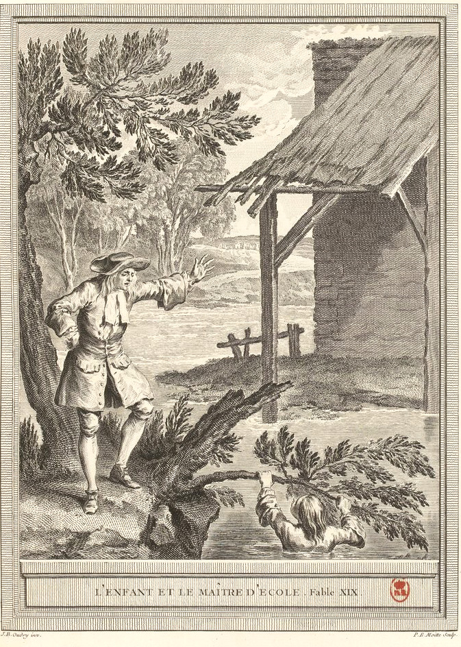 Gravure réalisée par Pierre Etienne Moitte d'après un dessin de Jean-Baptiste Oudry représentant la fable L'enfant et le maître d'école de Jean de La Fontaine (fable 19 du livre I). Cette gravure est parue dans l'édition complète des fables de La Fontaine, parue en quatre tomes chez l'éditeur Desaint & Saillant, rue saint Jean de Beauvais à Paris, 1755-1759.